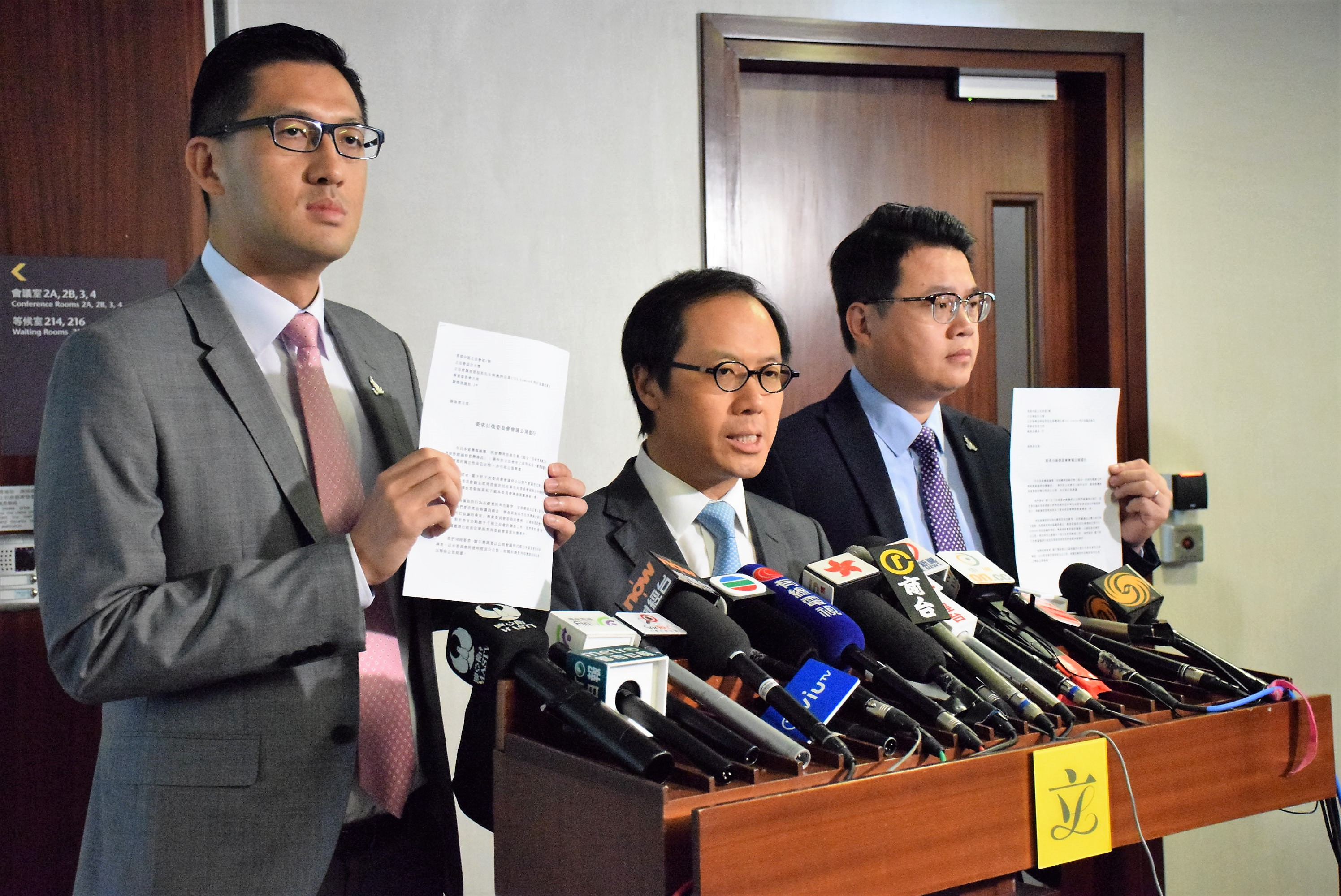 中文（香港）: 3名立法會UGL事件專責委員民主派成員會見傳媒。(美國之音湯惠芸攝）